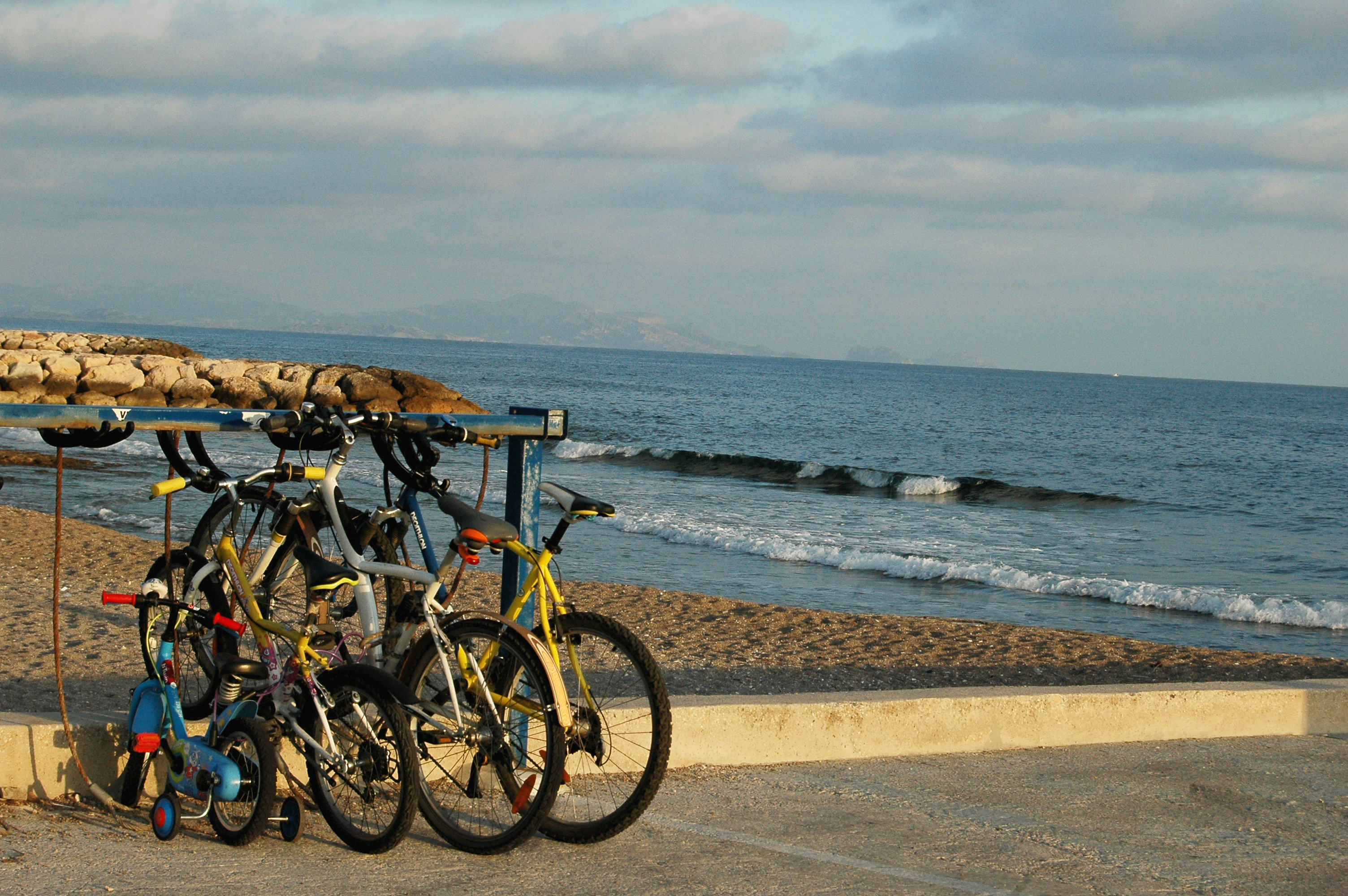 Marseille